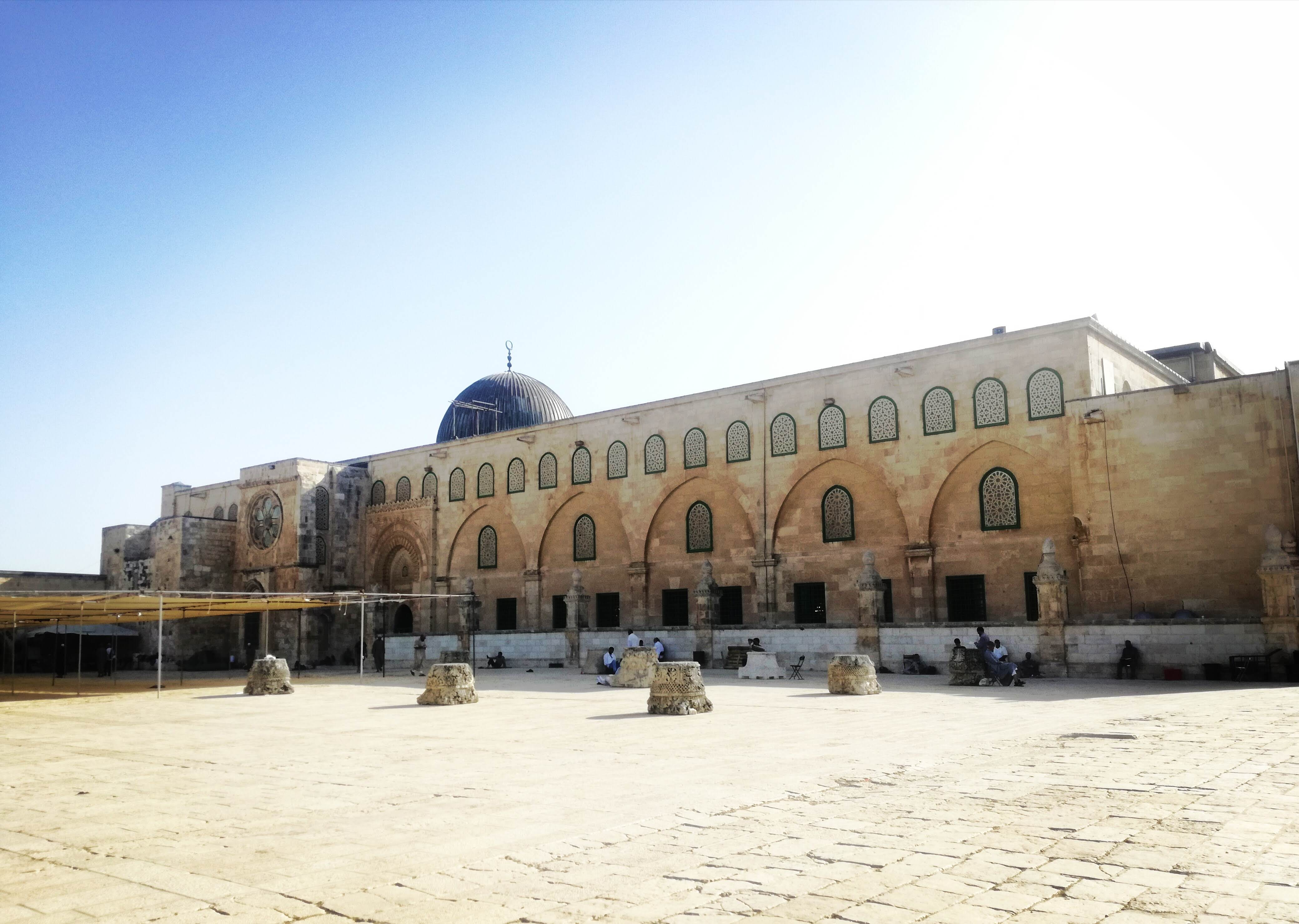 الساحة الخلفية للمسجد الأقصى